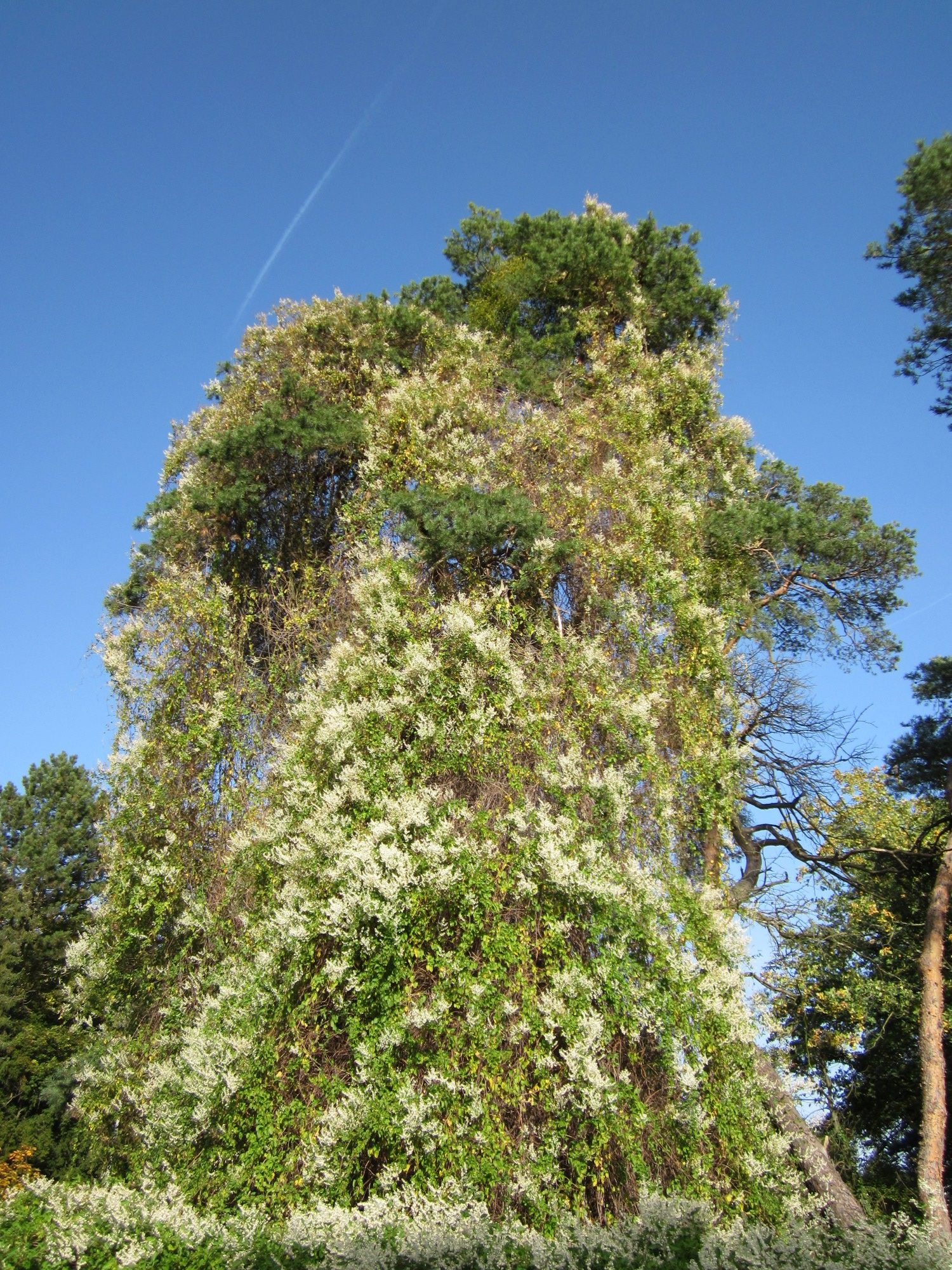 Schlingknöterich (Fallopia baldschuanica) an einer Kiefer in Hockenheim